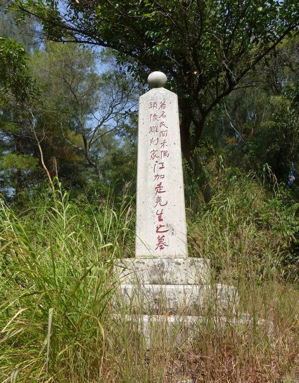 中文（中国大陆）: 清源山上江加走墓